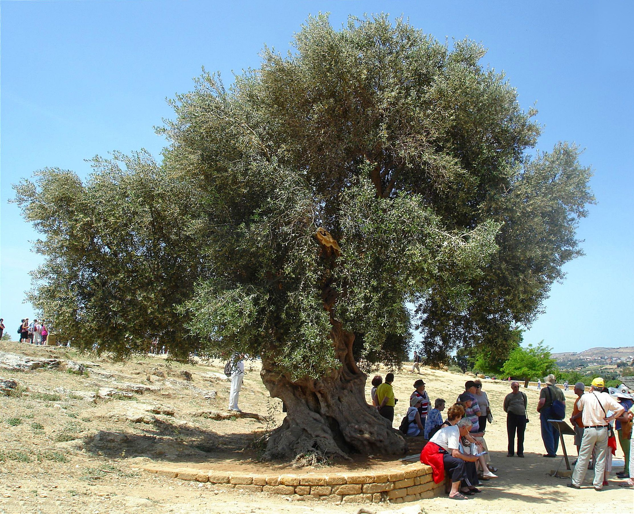 Măslin în parcul Valle dei templi (valea templelor) din Agrigento, Sicilia, cu vârsta de peste 500 ani